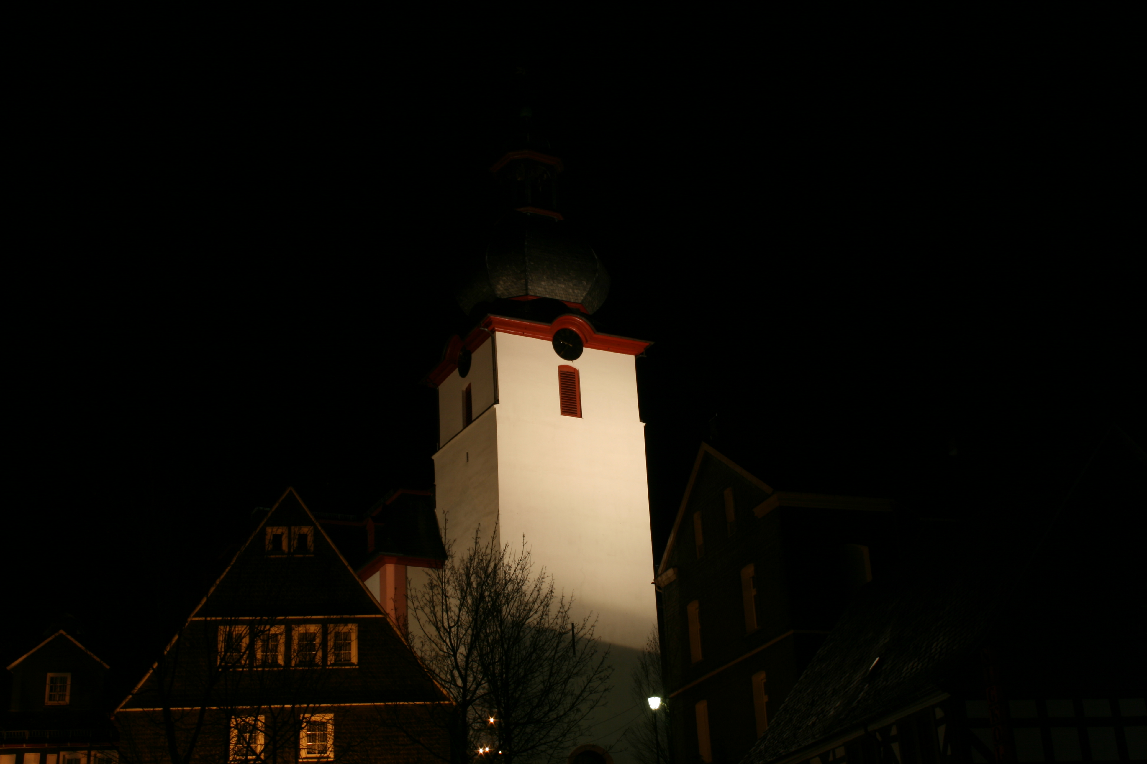 Daadener Kirche bei Nacht